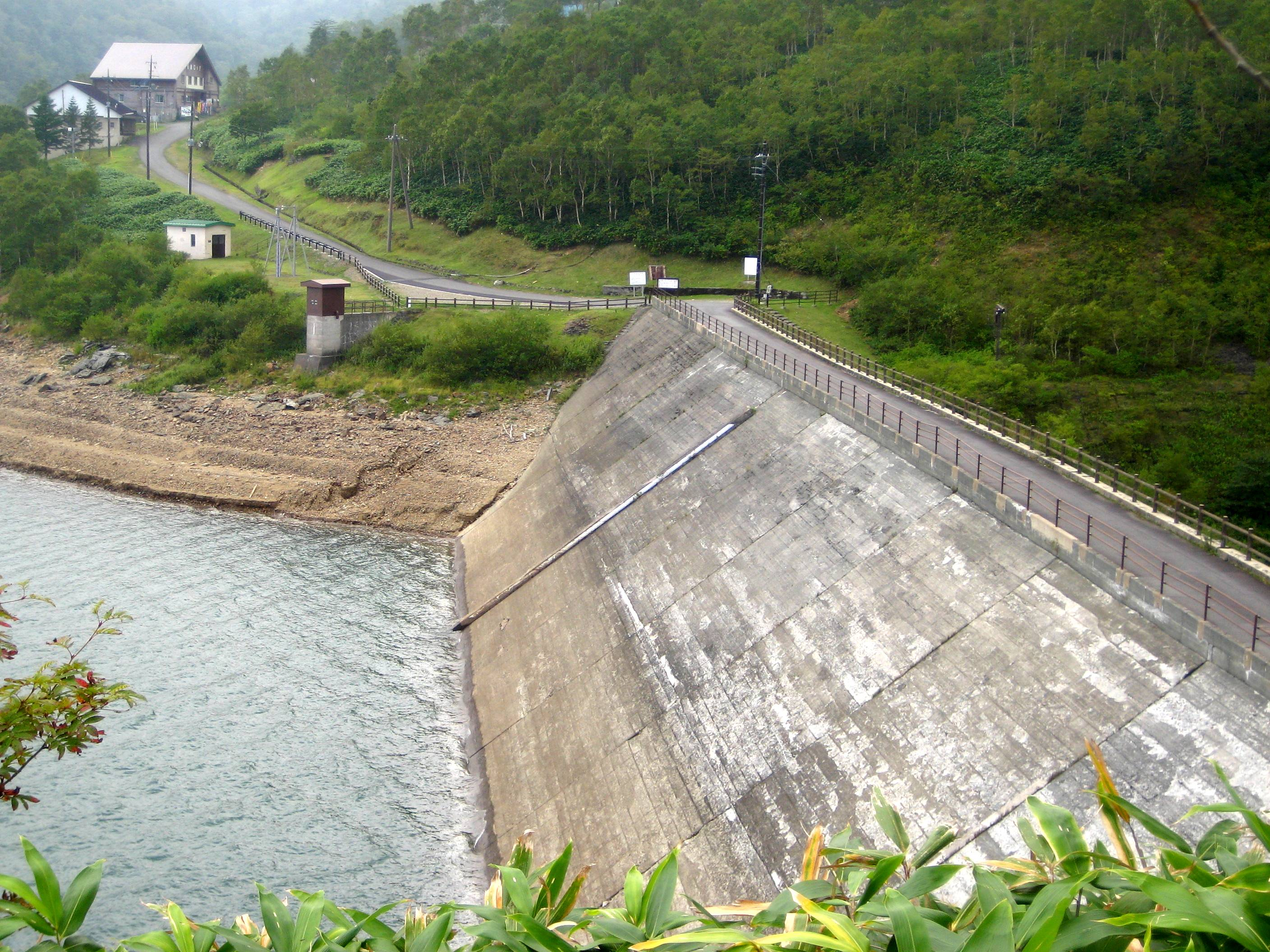 Nozori Dam (野反ダム) in Kuni village, Gunma prefecture, Japan.